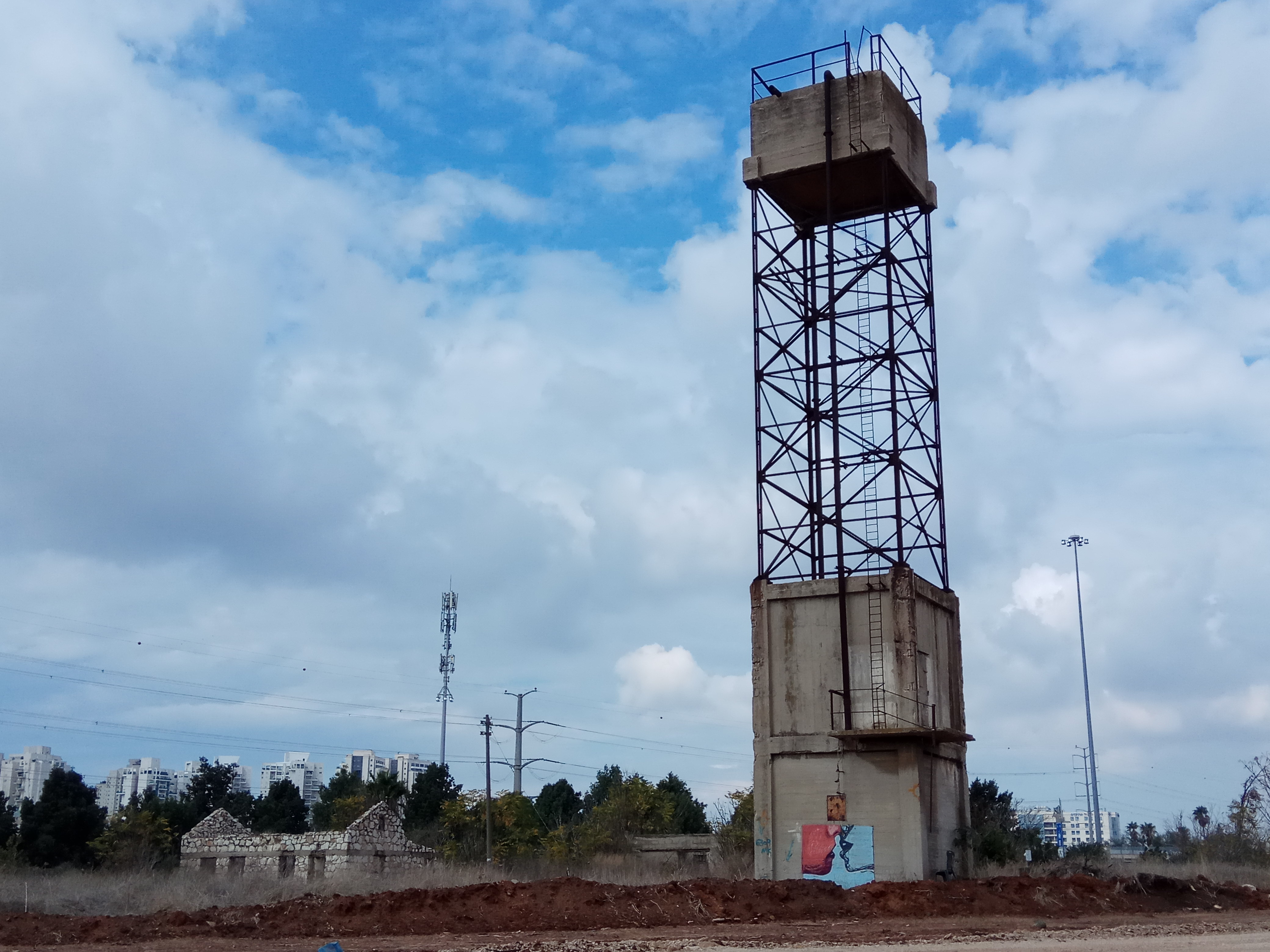 מגדל מים בכפר אזר